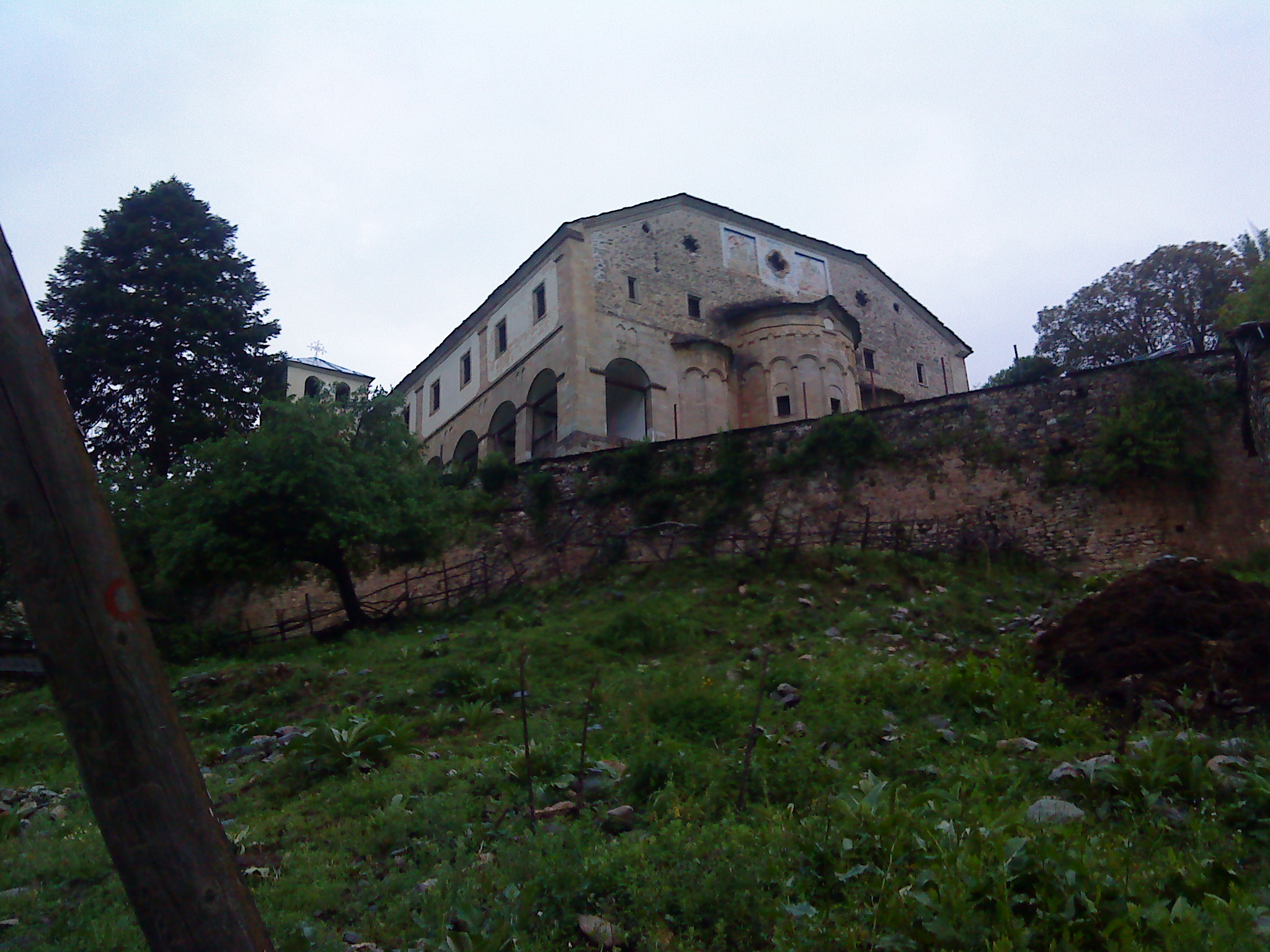 Црква св.петка во село Маловиште